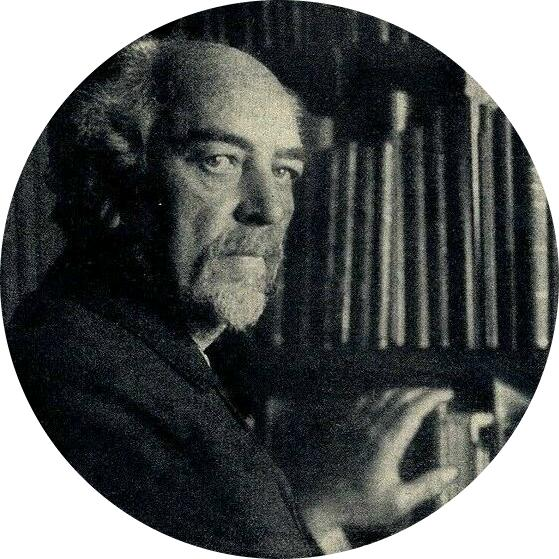 Professor Benno Erdmann, 1906